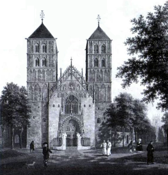 Ausschnitt aus Datei:Dom Muenster 1784.jpg (gemeinfrei)